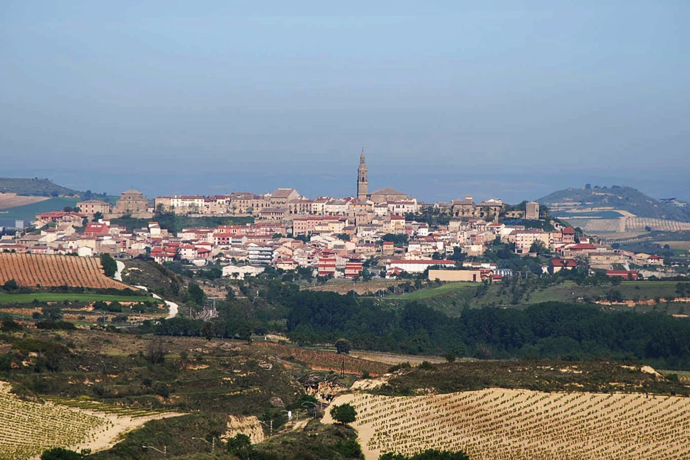 Vista de Briones (La Rioja - España) desde el castillo de Davalillo.